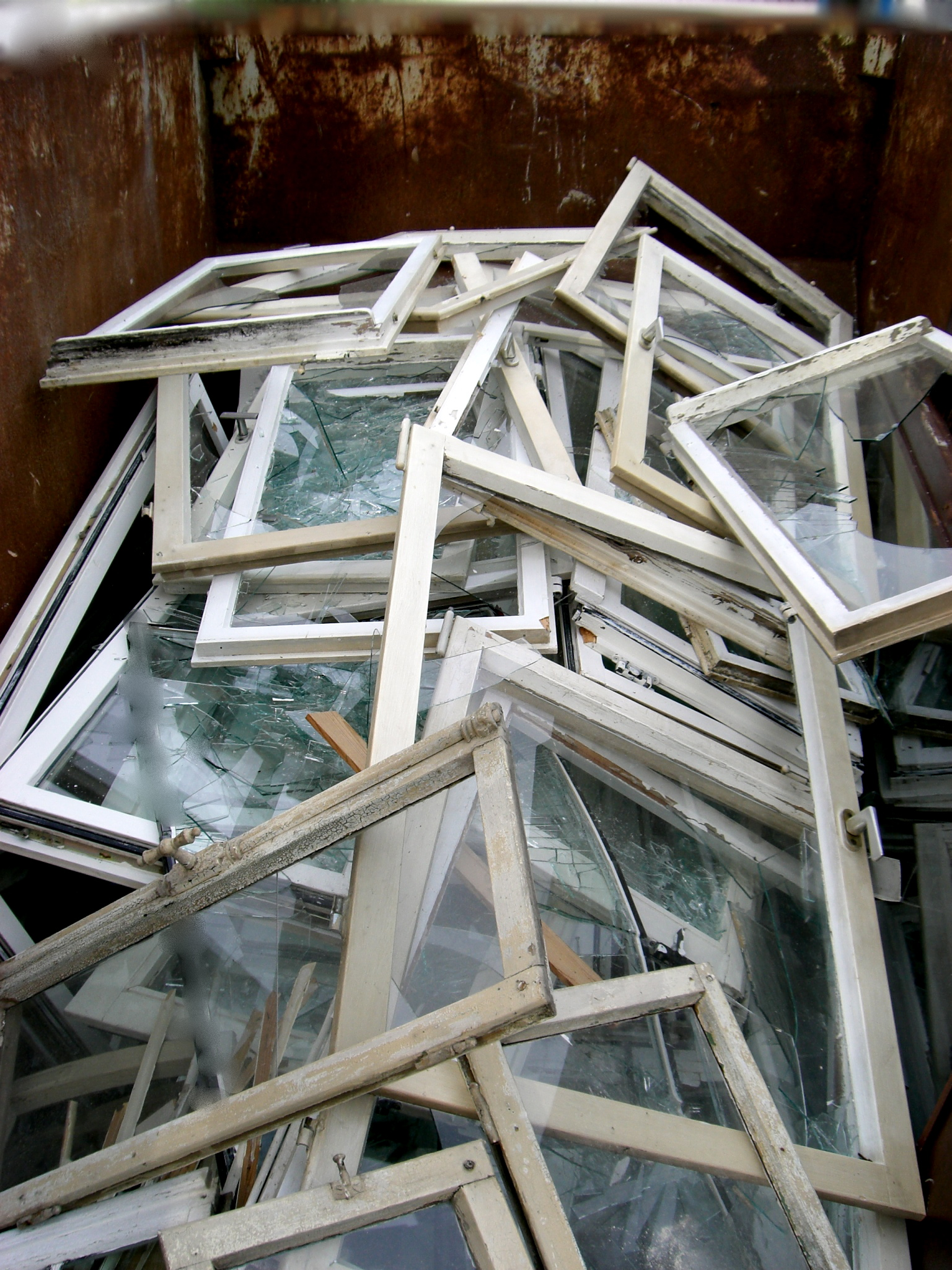 Entsorgung ausgebauter Fenster nach einer Fenstersanierung.